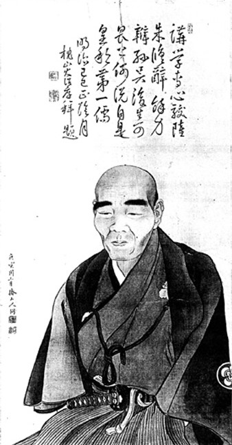 安積艮斎の肖像画。